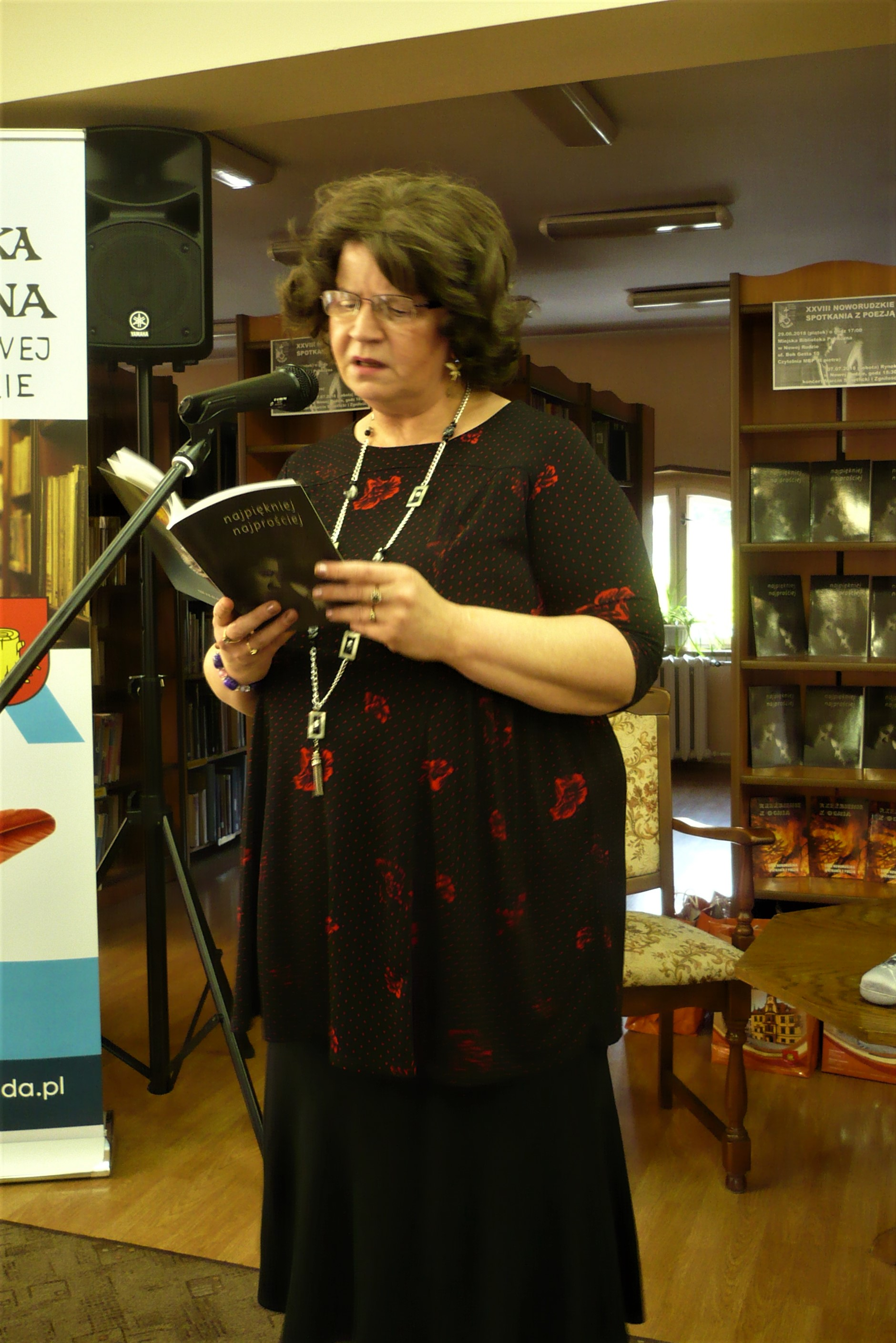 Anna Piliszewska